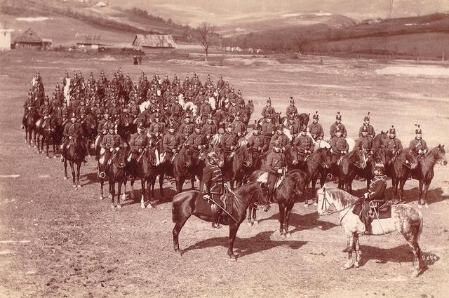 10. dom. husarska pukovnija, Varaždin